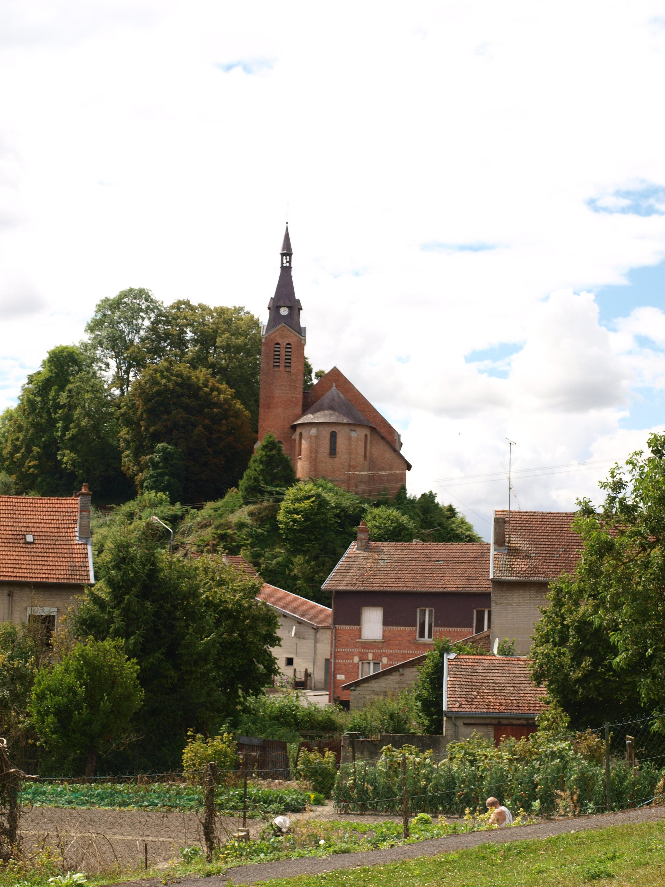 Autry (Ardennes, France) ; l'église surplombant le village